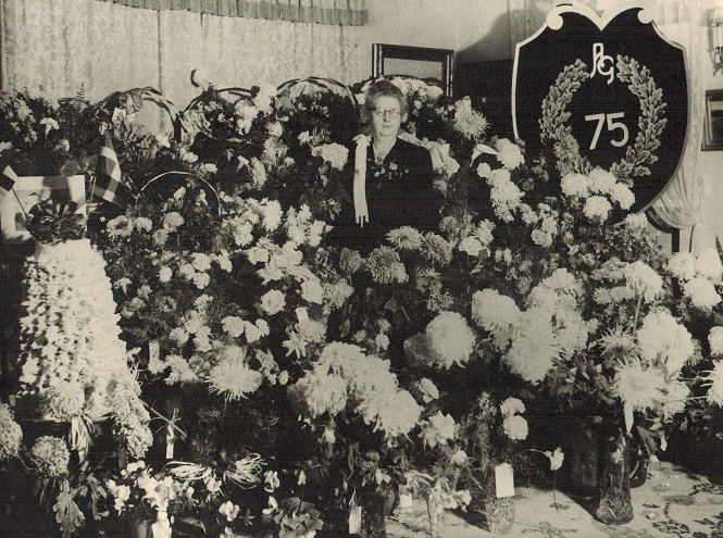 Aline Grönberg 75